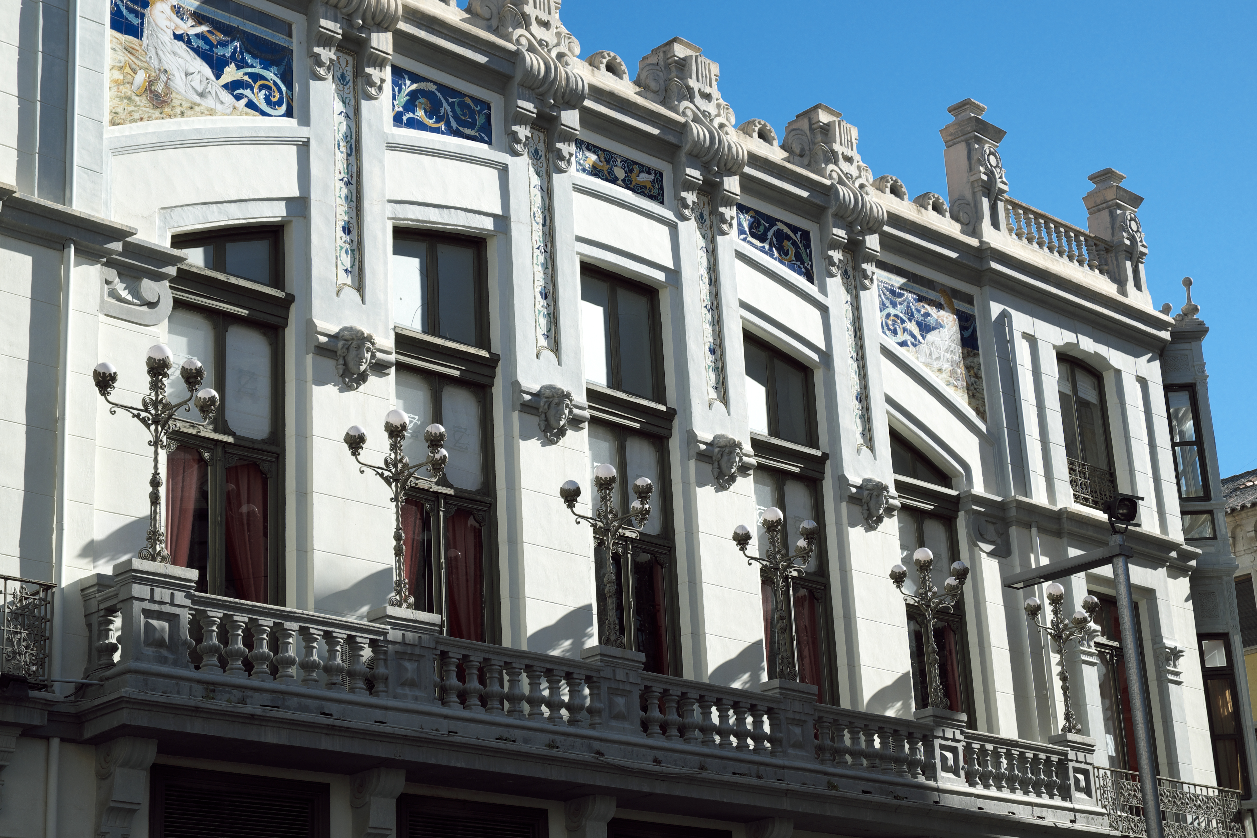 Casino de Zamora in Zamora (Kastilien-León/Spanien), von Miguel Mathet y Coloma, von 1905